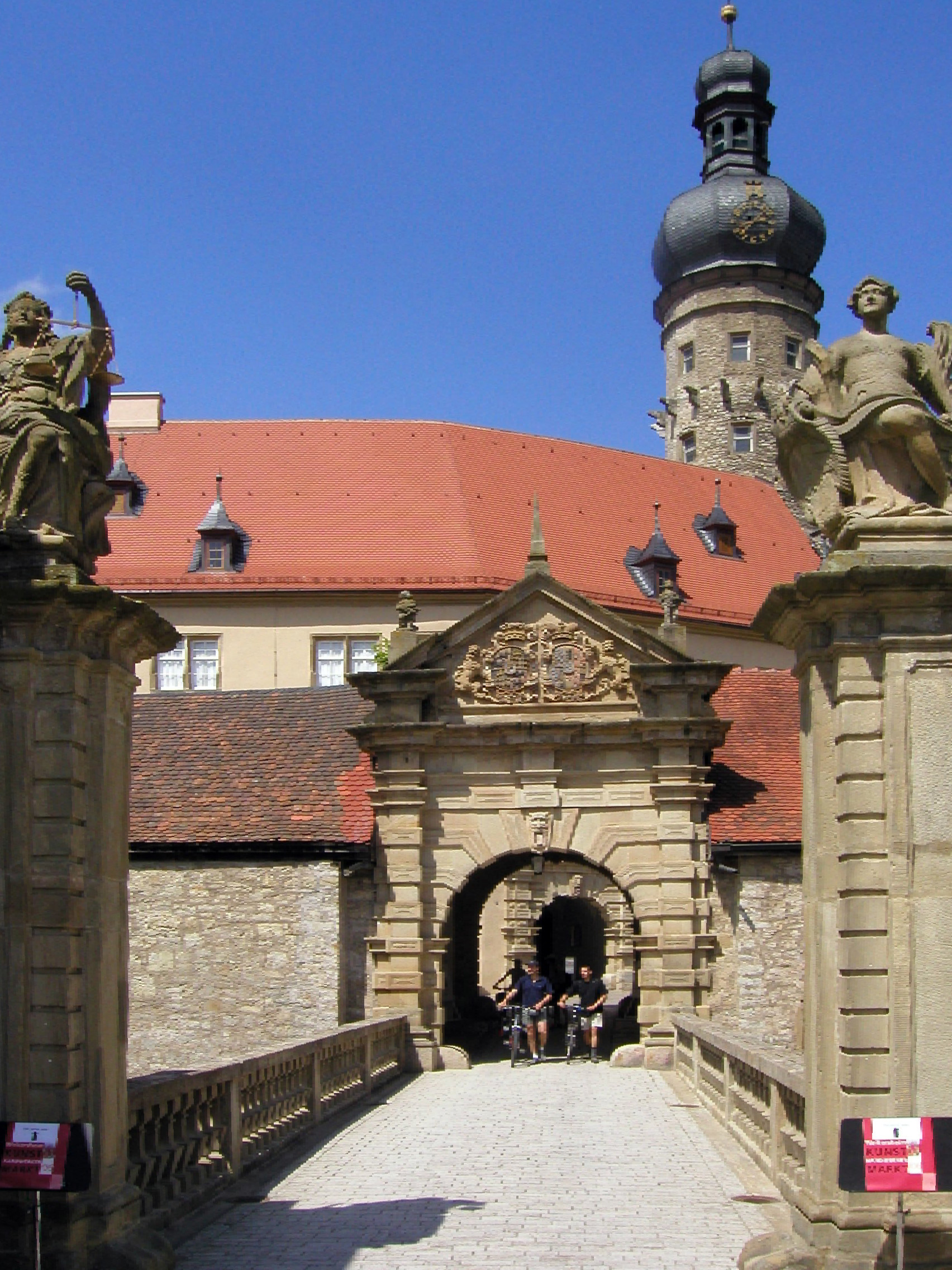 Eingang zum Schloss Weikersheim